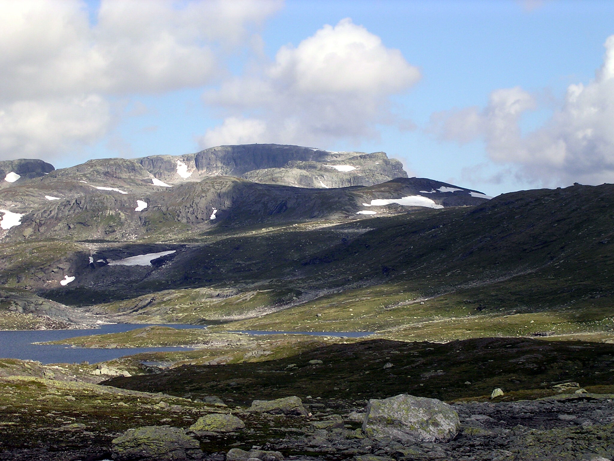 Sandfloegga seen from the lake Holmasjøen at Hardangervidda (from south-east).